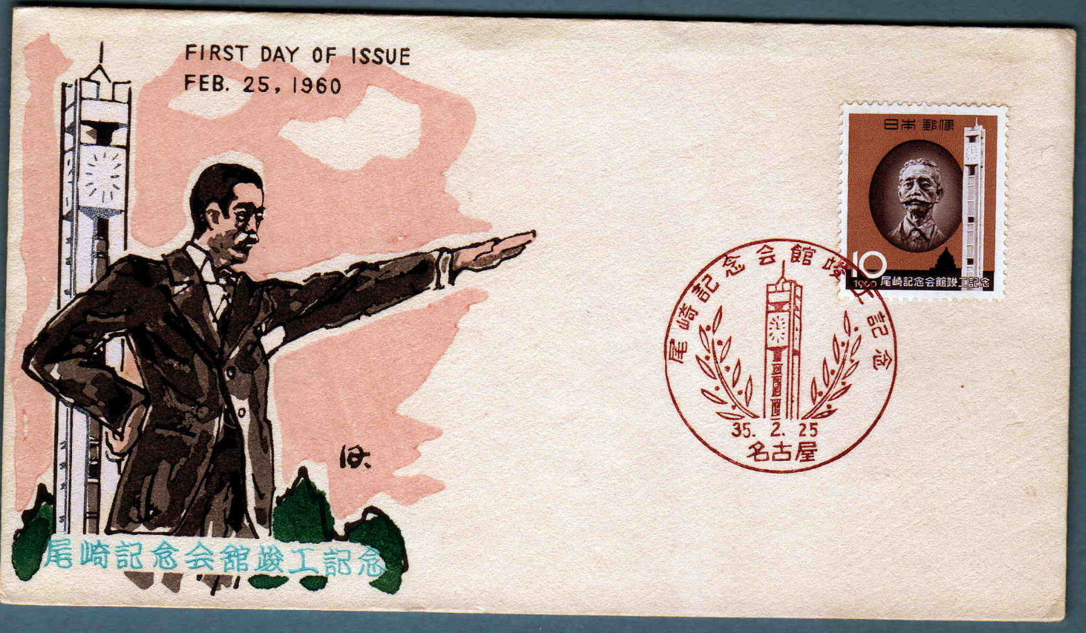 東京都にあった尾崎記念会館完成記念切手の初日カバー。名古屋郵便局の昭和35年2月25日の記念印が押印されている。現在は憲政記念館となっている。